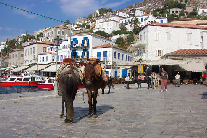 Hydra with donkey